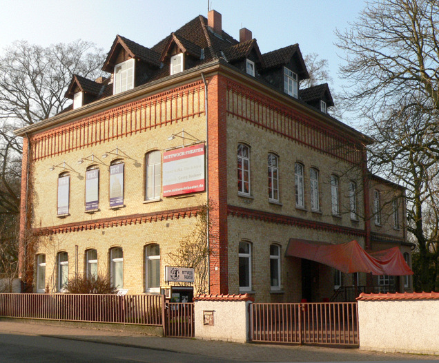 Gebäude am Lindener Berg in Hannover, Jazzclub im Keller